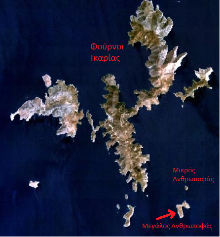 Οι νησίδες Μεγάλος και Μικρός Ανθρωποφάς στους Φούρνους Ικαρίας